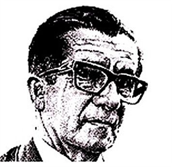 Pedro Paes Mendonça, empresário brasileiro.